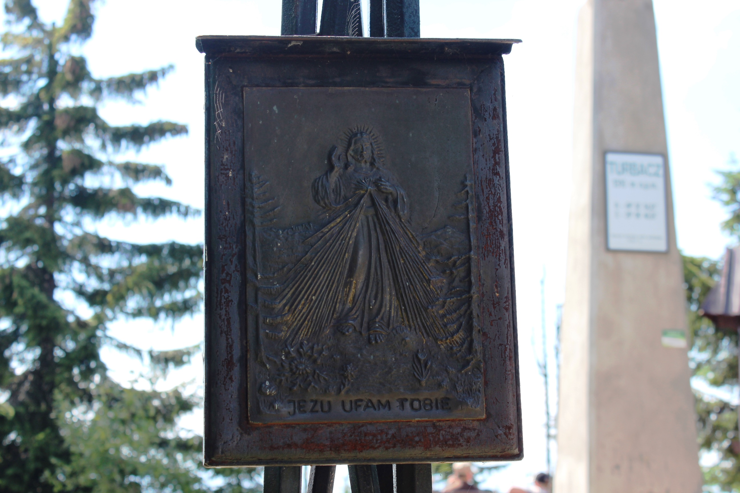 Turbacz